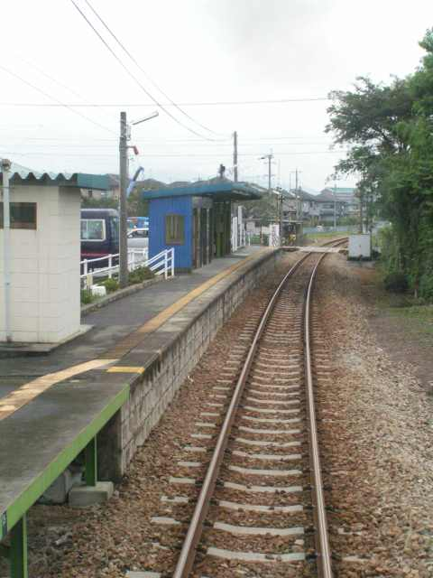 山隈駅 投稿者が撮影(2006/08/29)